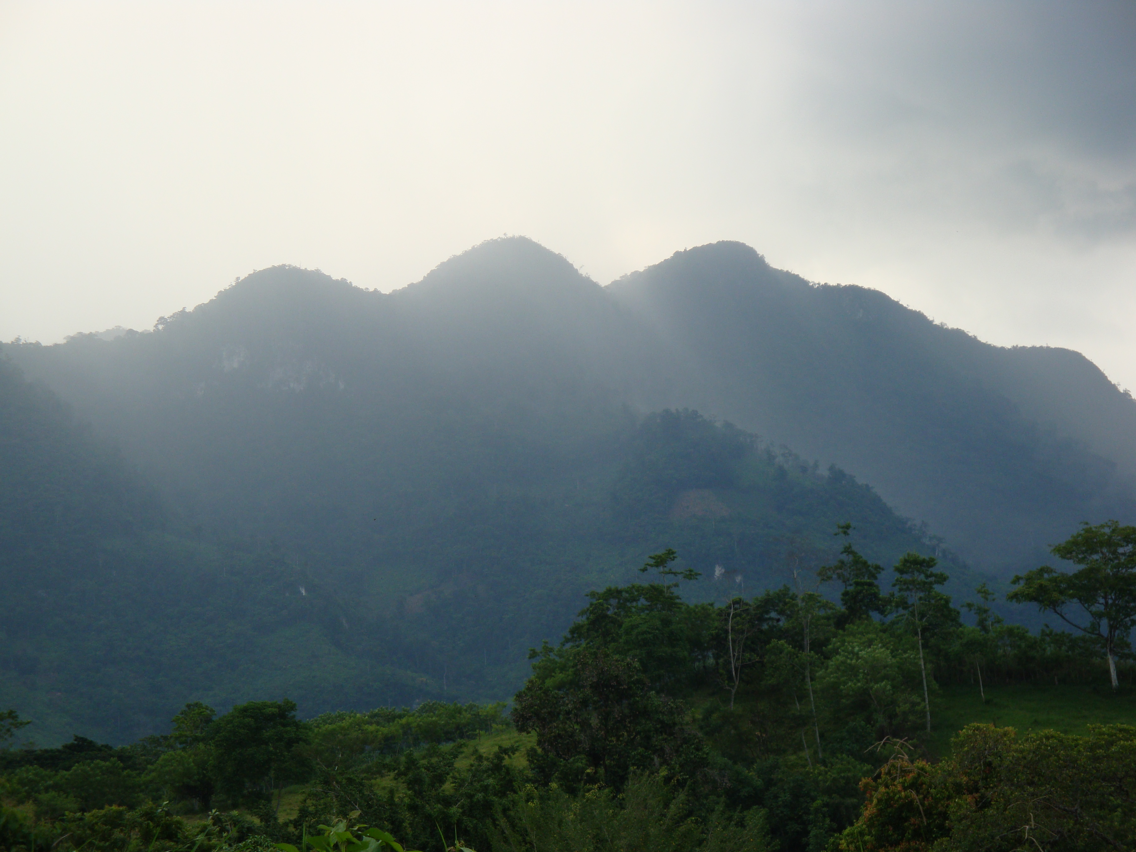 El Madrigal, de 1,000 m. de altura en la reserva ecológica "Sierra de Tabasco" es la montaña más elevada de Tabasco.